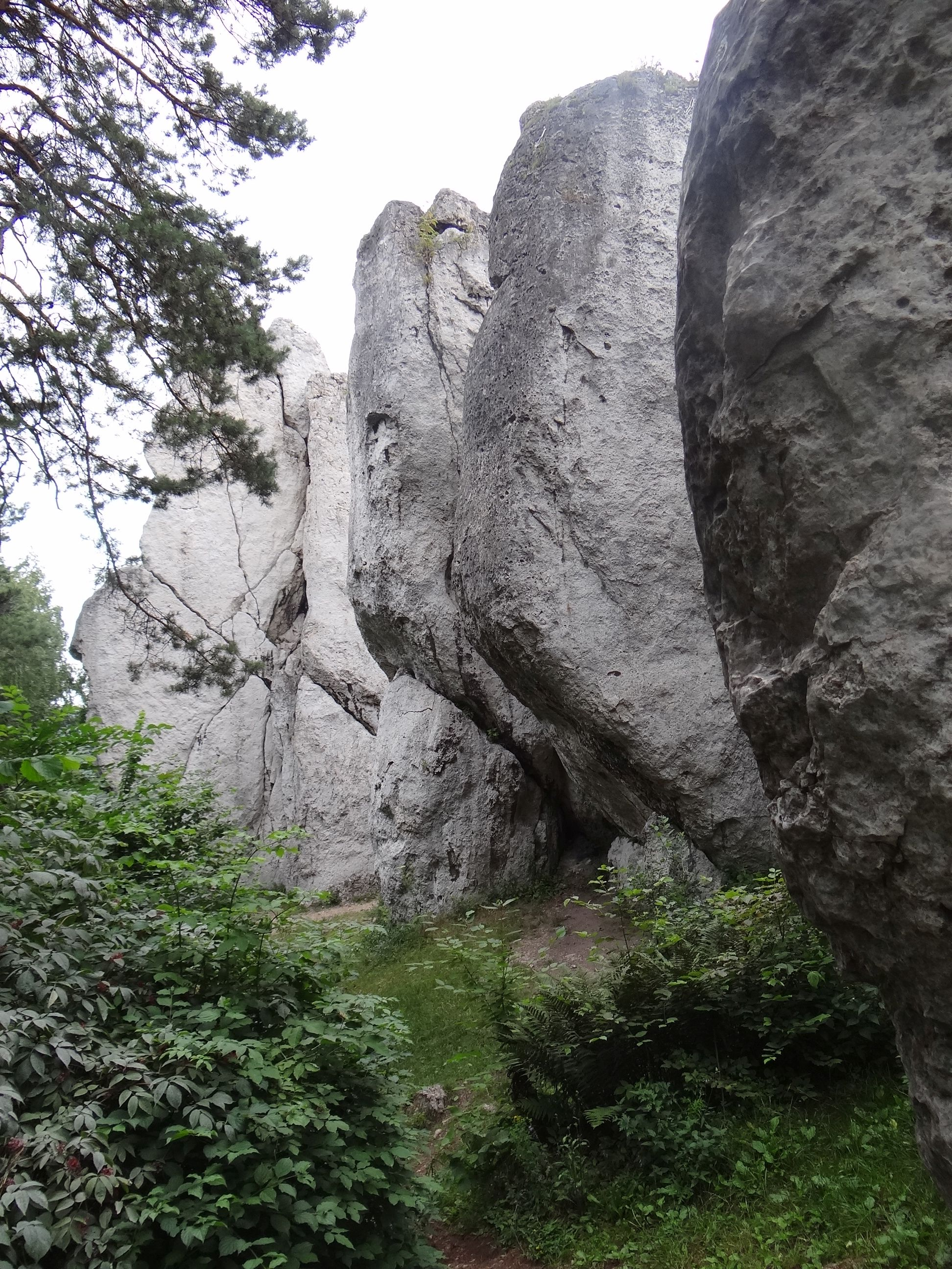 Skały Dziewica, Tata, Mama i Córki na wzniesieniu Kołaczyk w Podlesicach